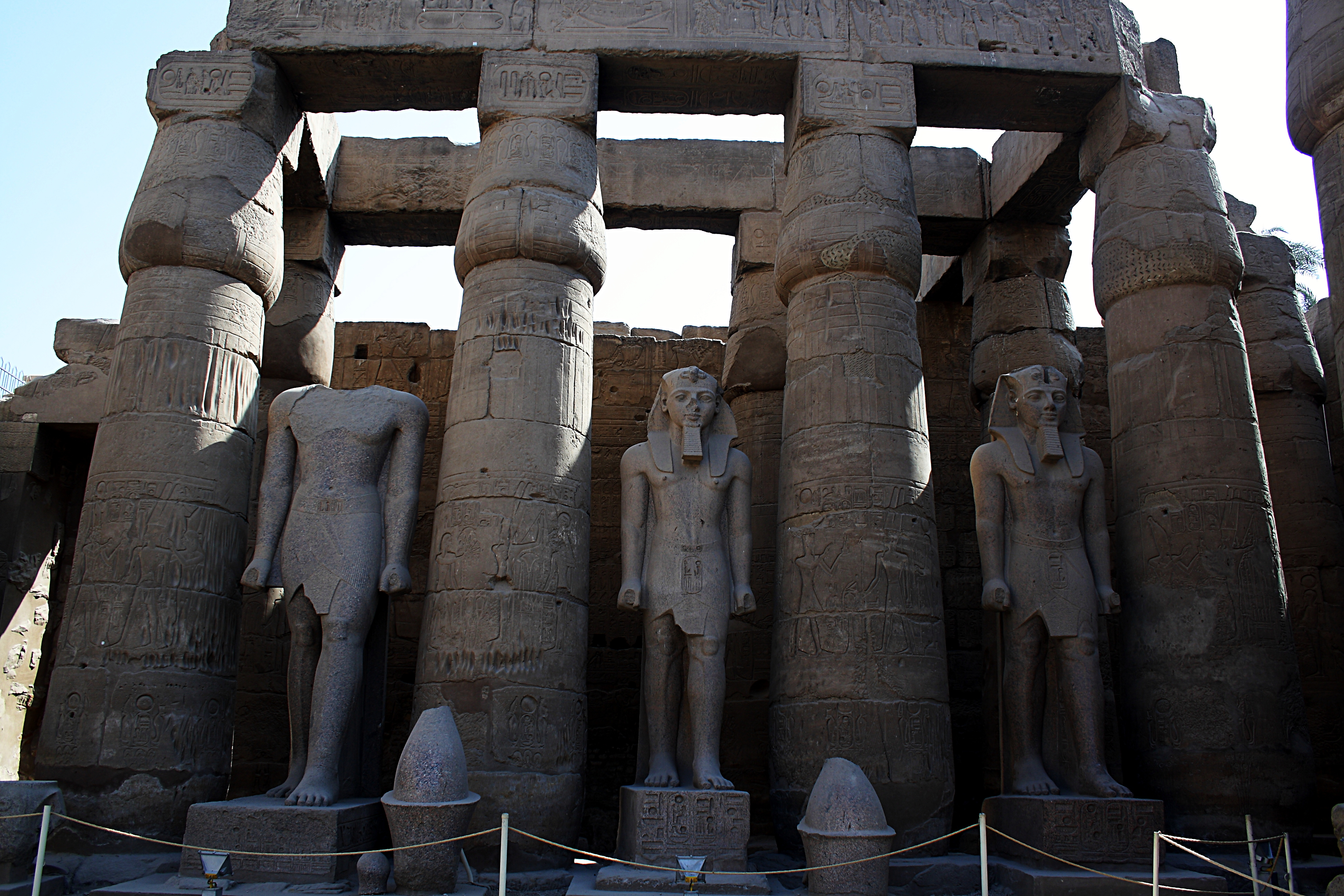 Luxor Tempel